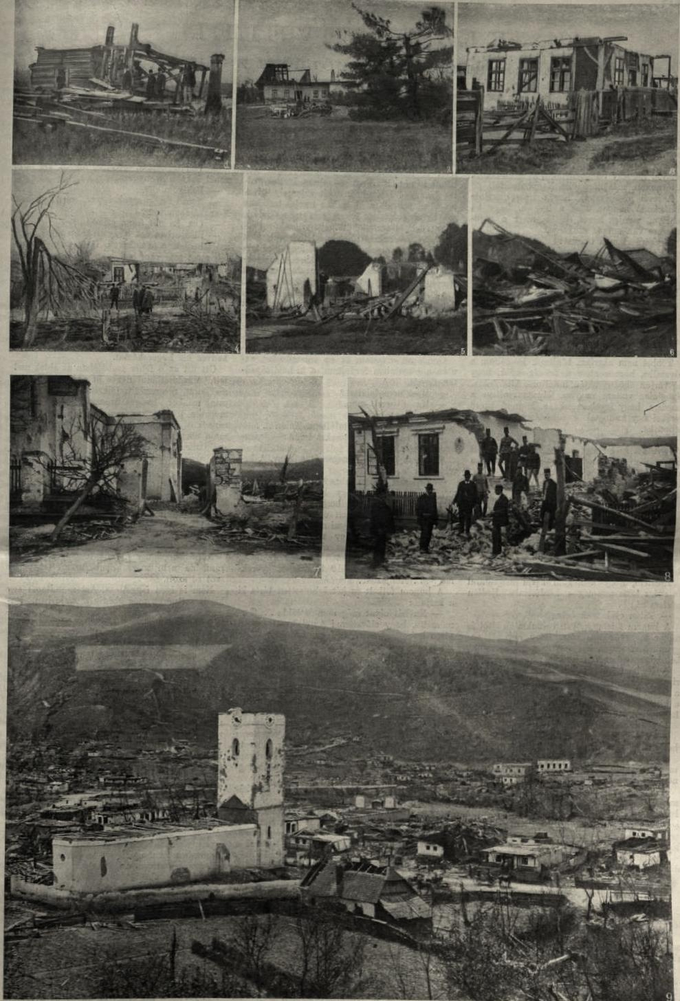 Szélvihar „Ez év május 13-ikán Szatmár, Szolnok-Doboka, Kolozs, Marostorda és Udvarhely Vármegyéken át, hazánkban eddig nem ismert orkán, az úgynevezett tornádó vonult végig, útjában pusztulást, kétségbeesést és szegénységet hagyván hátra. Legnagyobb kárt Szolnok- Doboka megye Bálványos vára és Marostorda vármegye Beresztelke községeiben okozott. Ezek közül is Beresztelke község áll első helyen, ahol két embert életétől fosztott meg.”